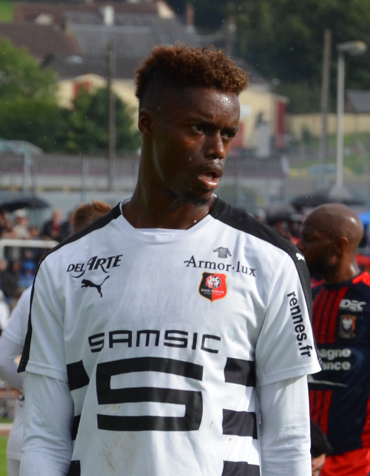 Photographie prise lors du match opposant le Stade rennais au SM Caen en match amical au stade Pierre-Compte de Vire le 22 juillet 2017. Ici, Adama Diakhaby.